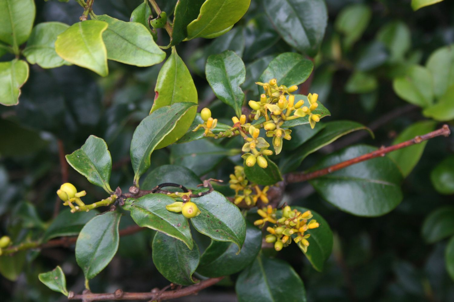 Gaiadendron punctatum, Riemenblumengewächse (Loranthaceae) - Costa Rica: Prov. Cartago, Cordillera de Talamanca, Fahrweg E Carretera Interamericana, N Cerro Sákira, 3200-3250 m